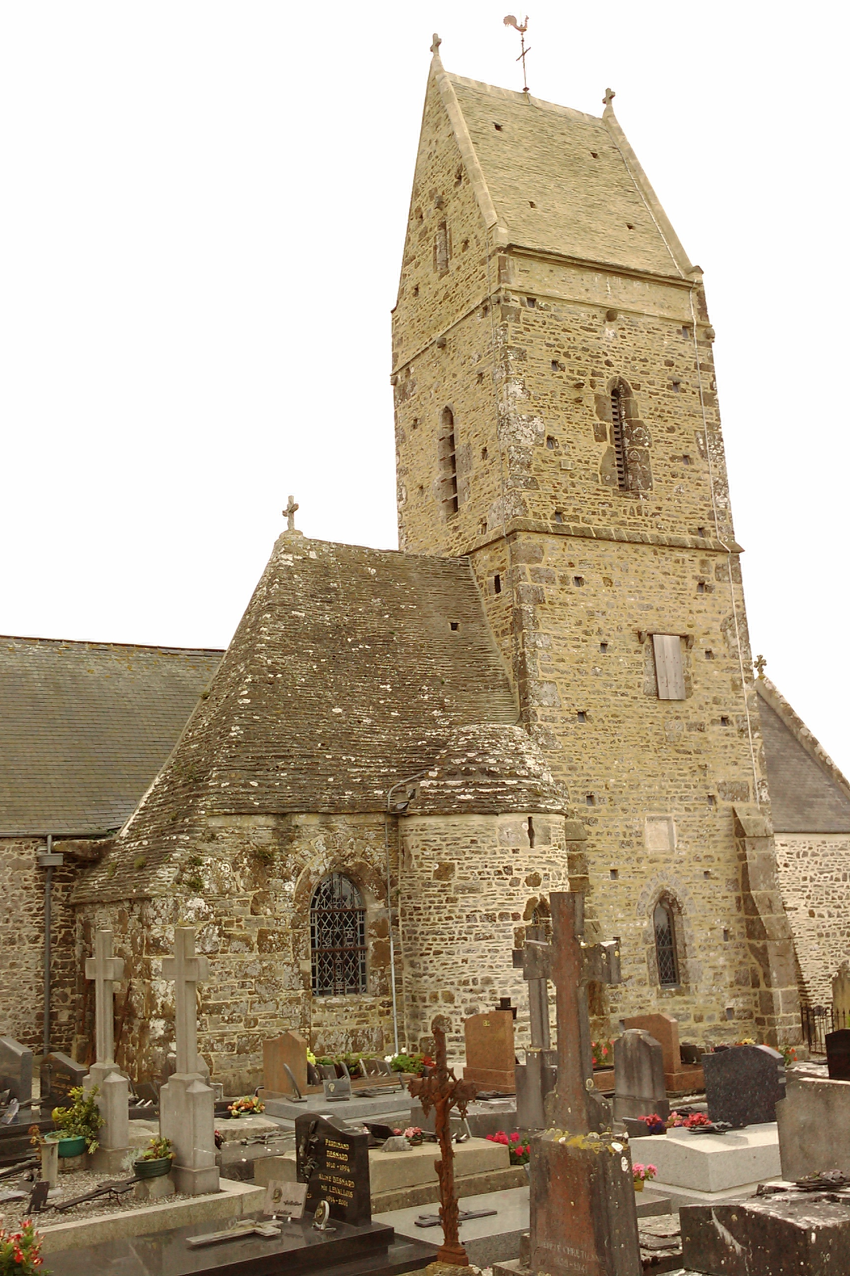 église (XIVe,XVe) de Saint-Georges-de-la-Rivière Le clocher est contruit pour servir de tour de guet et de défense